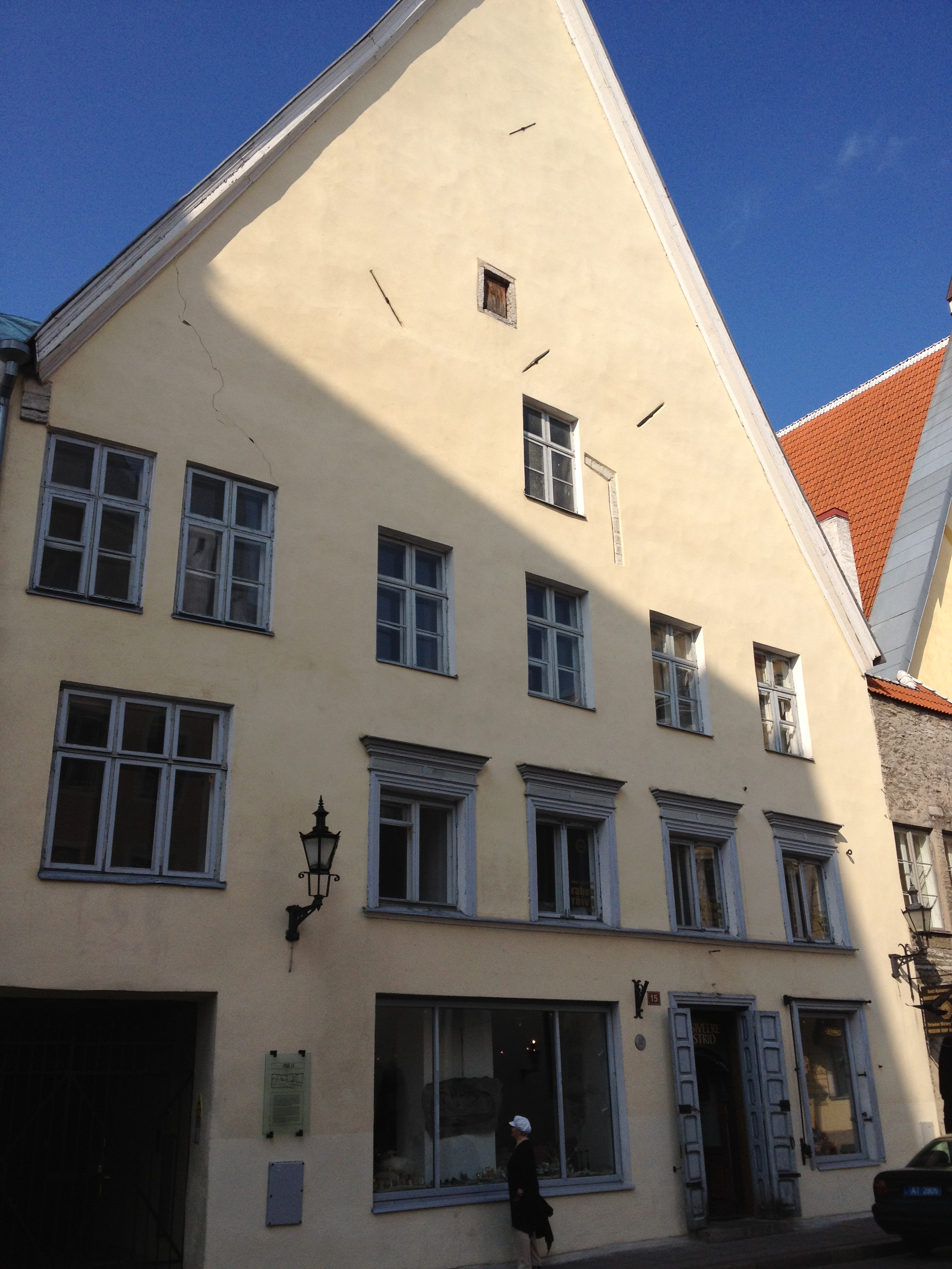 Elamu Pikk tn15 hooviansambliga, 15.-20.saj.